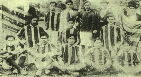 El Primer Equipo del Club Cerro Porteño ya se consagraba campeón.